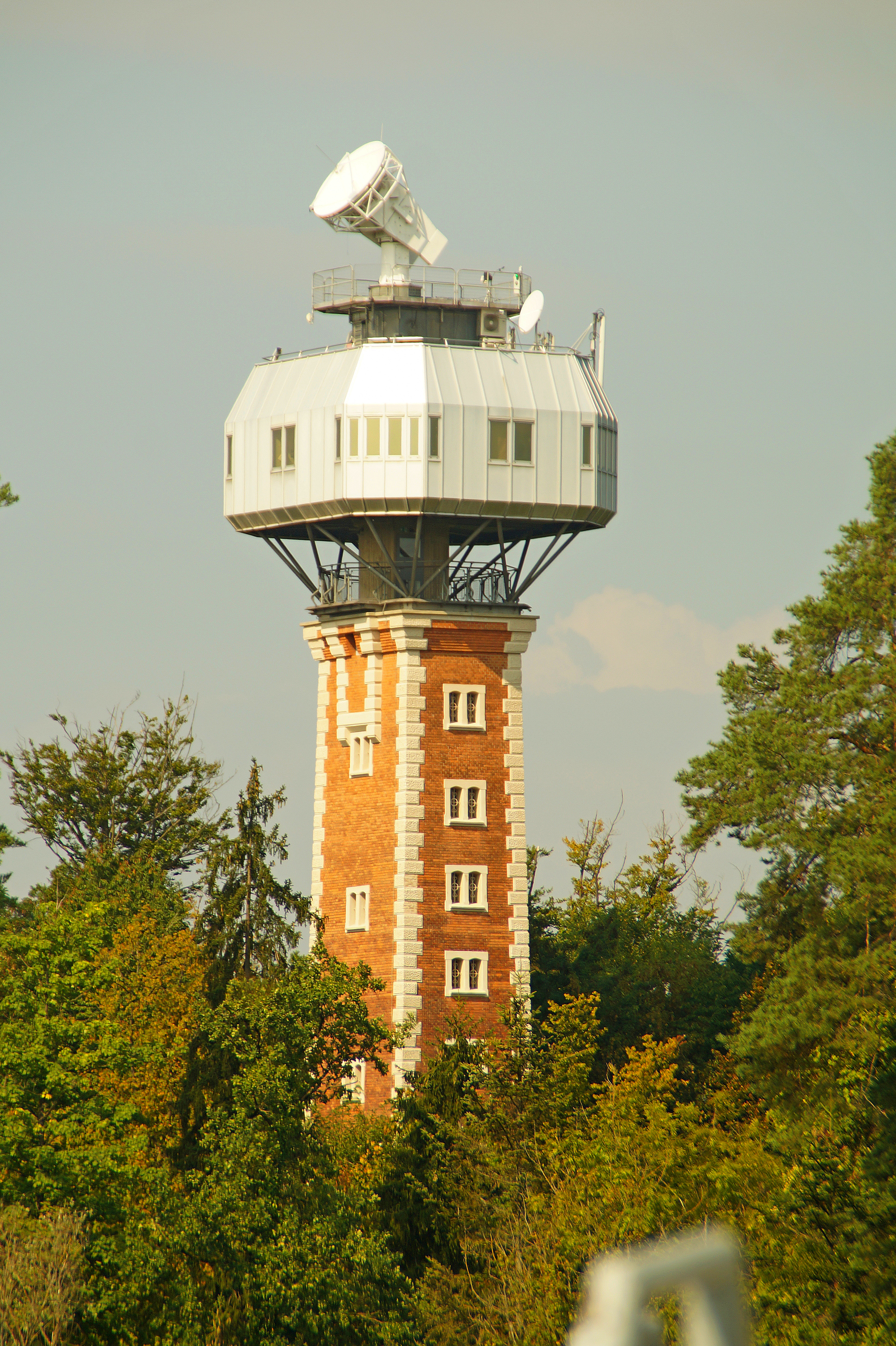 Die Hilmwarte im Grazer Leechwald mit der Wetterradarstation